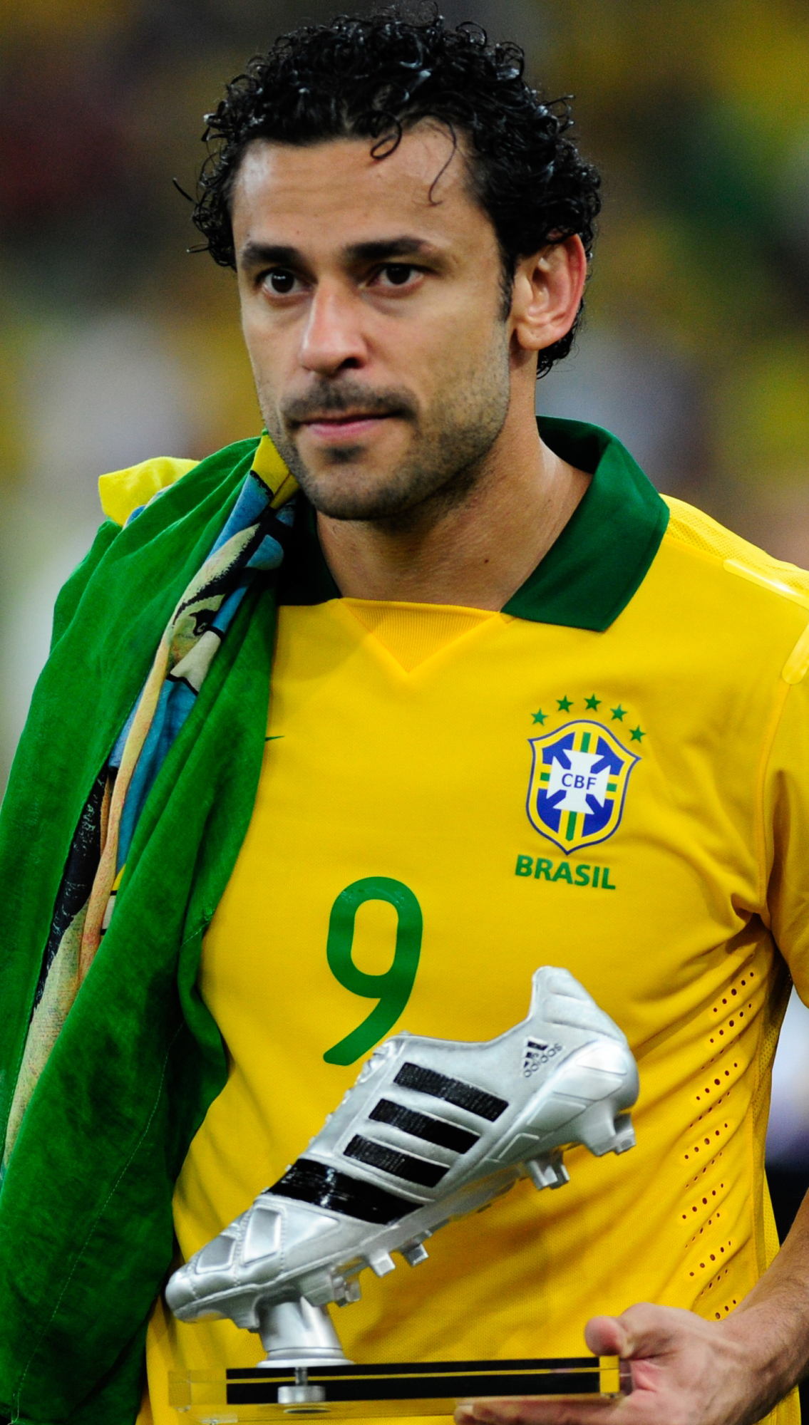 O Brasil venceu a Espanha por 3 a 0 na noite de hoje (30), no Estádio Jornalista Mário Filho, o Maracanã, e levou o título da Copa das Confederações 2013. Com a vitória, o Brasil tornou-se tetracampeão do torneio, que reúne o atual campeão do mundo e os campeões de cada confederação continental.